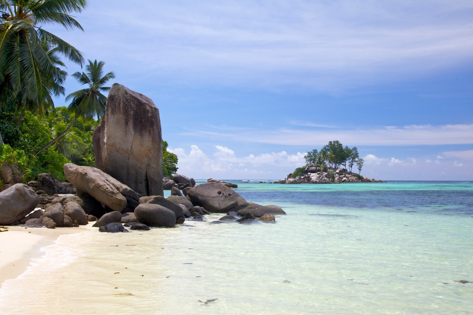 Anse Royale, Île Souris, Seychelles